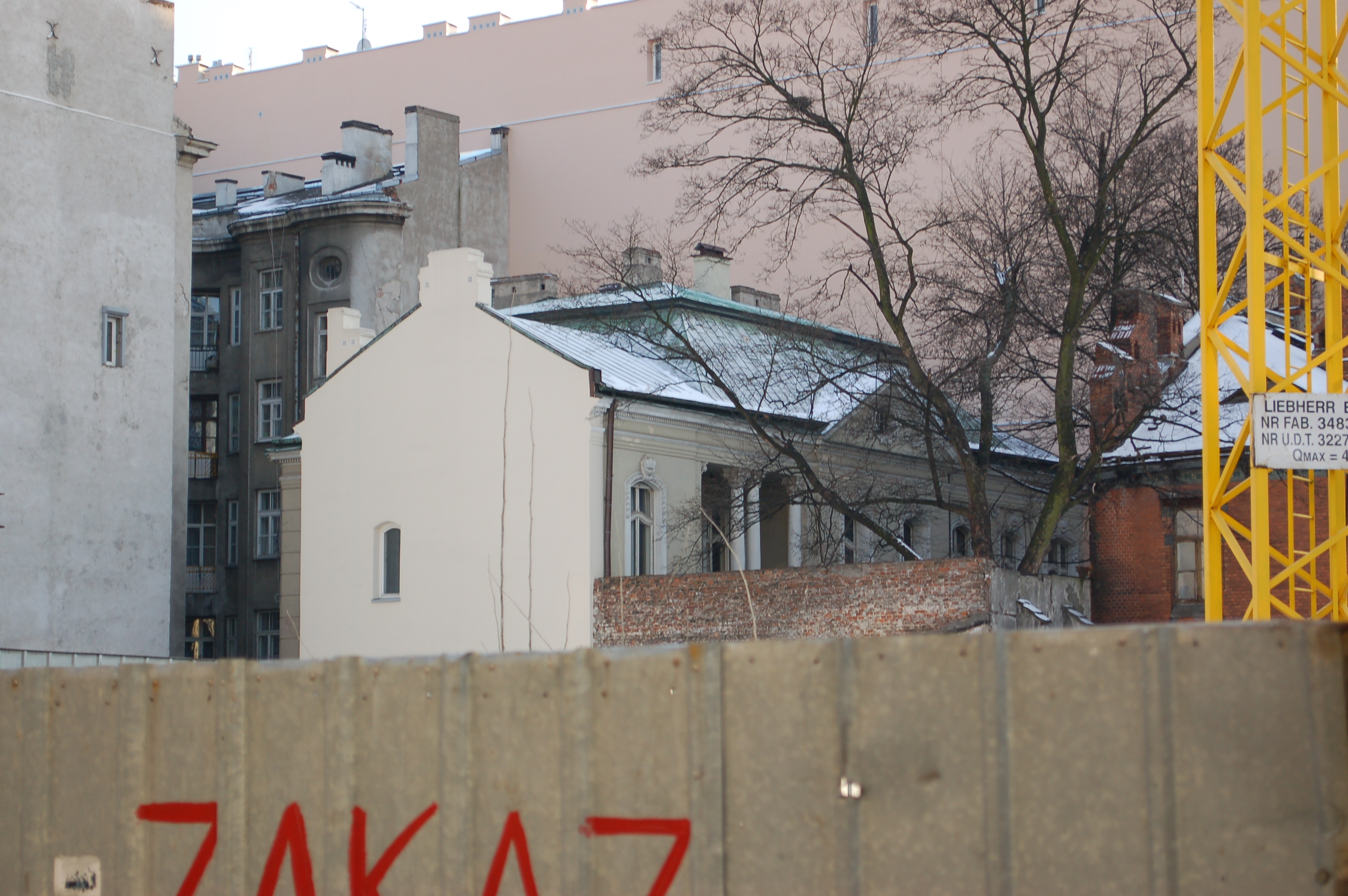 Koszykowa Market Halls in Koszykowa Street in Warsaw, under demolitian/reconstruction, january 2012. Rusiecki palace from backside